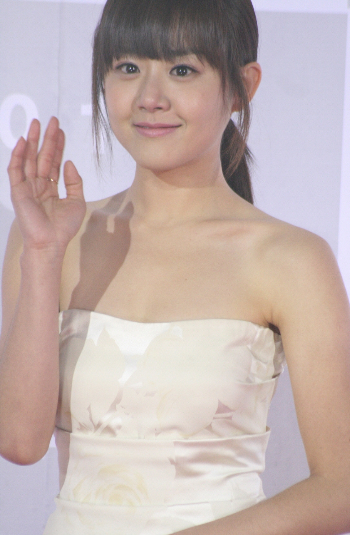 2010KBS연기대상 492